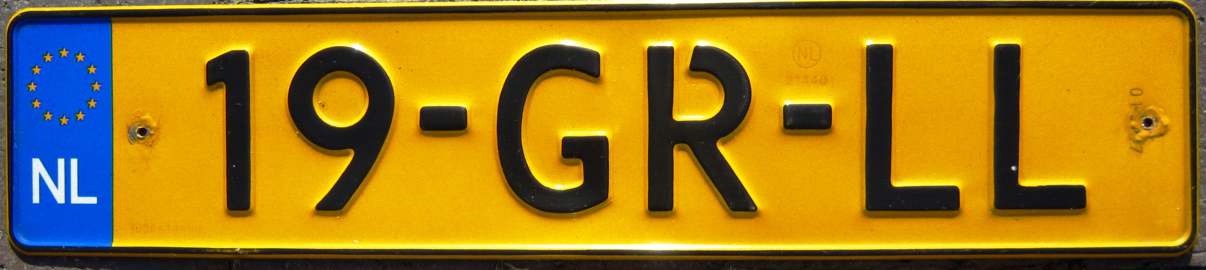 huidig kenteken